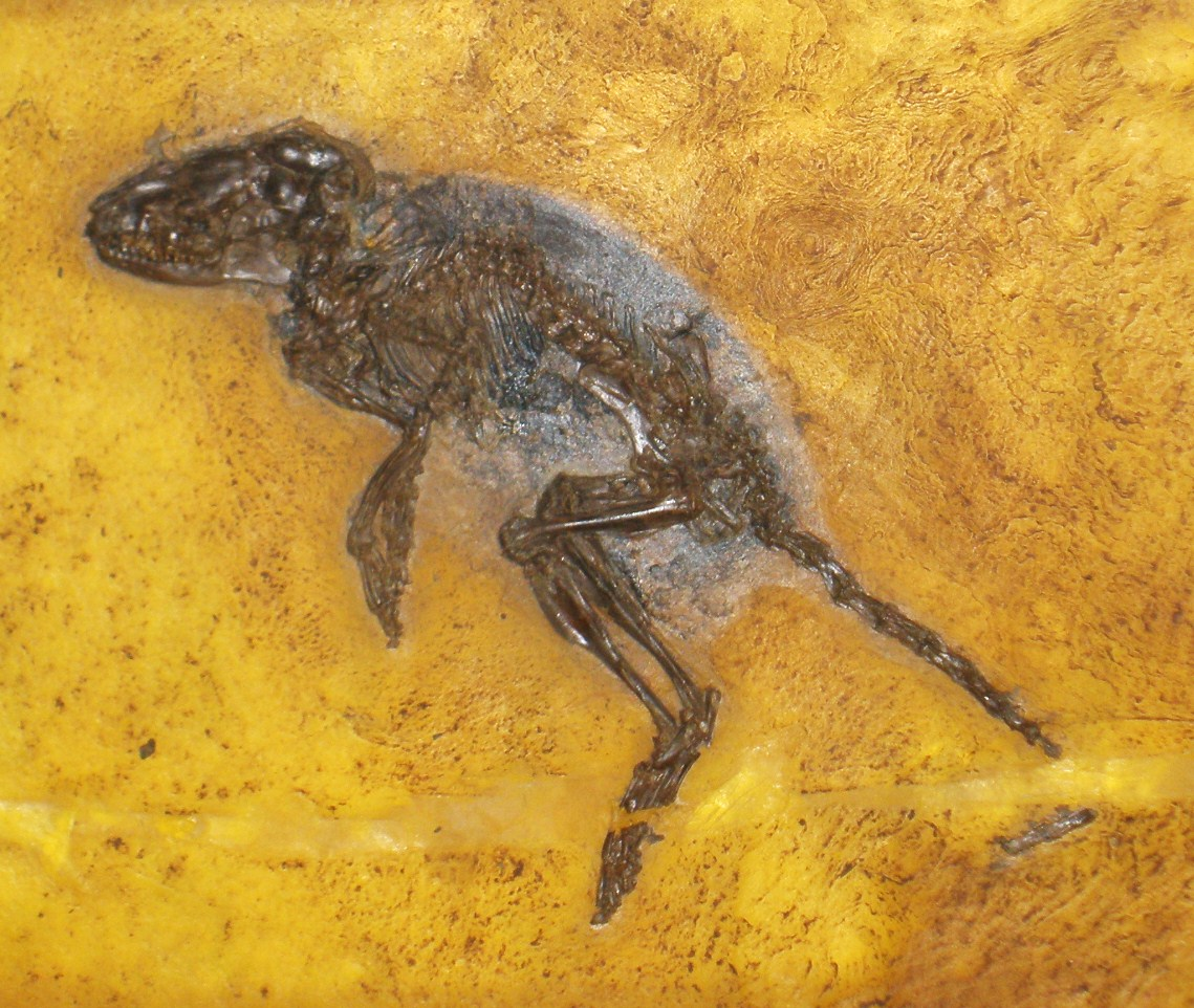 Fossil of Macrocranion, an extinct mammal- Took the photo at Senckenberg Museum of Frankfurt